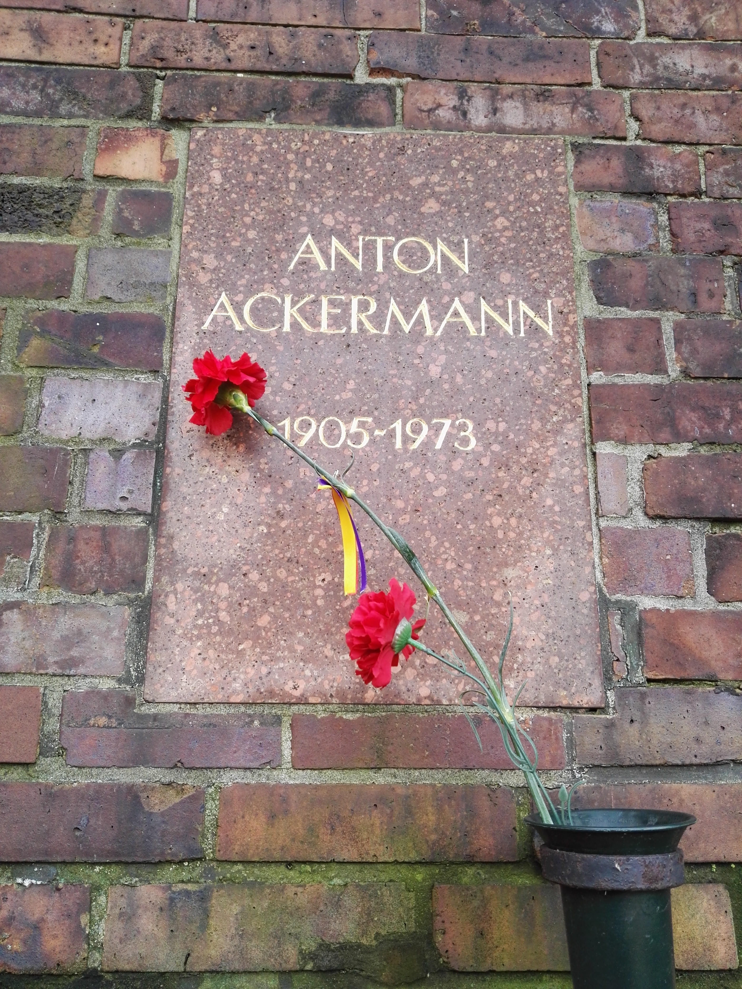 Grab von Anton Ackermann in der Gedenkstätte der Sozialisten auf dem Zentralfriedhof Friedrichsfelde in Berlin-Lichtenberg